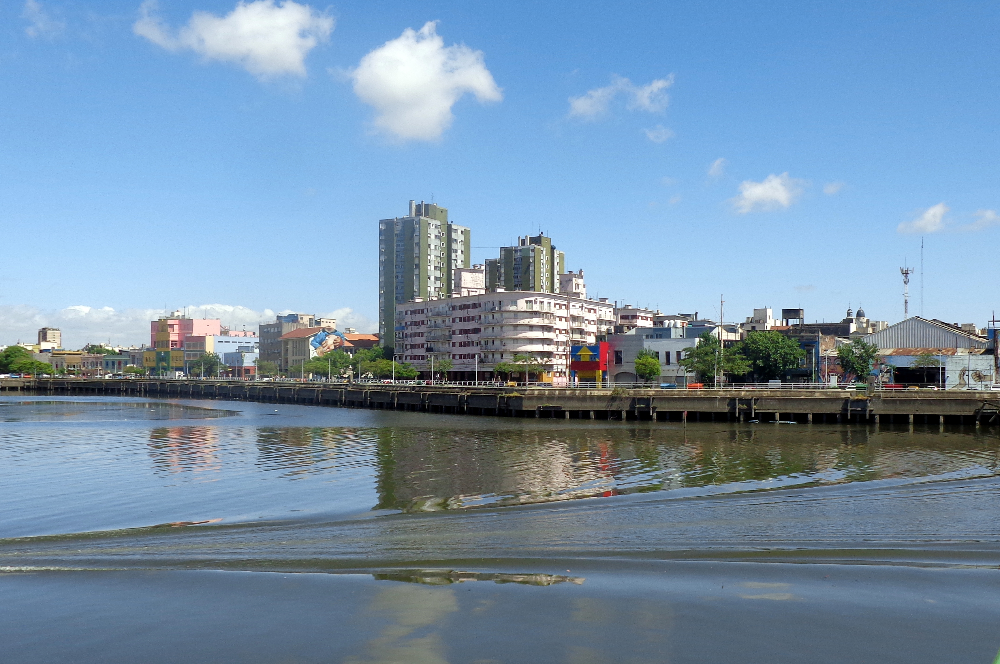 Vista de La Boca desde la orilla opuesta, Buenos Aires, Argentina.